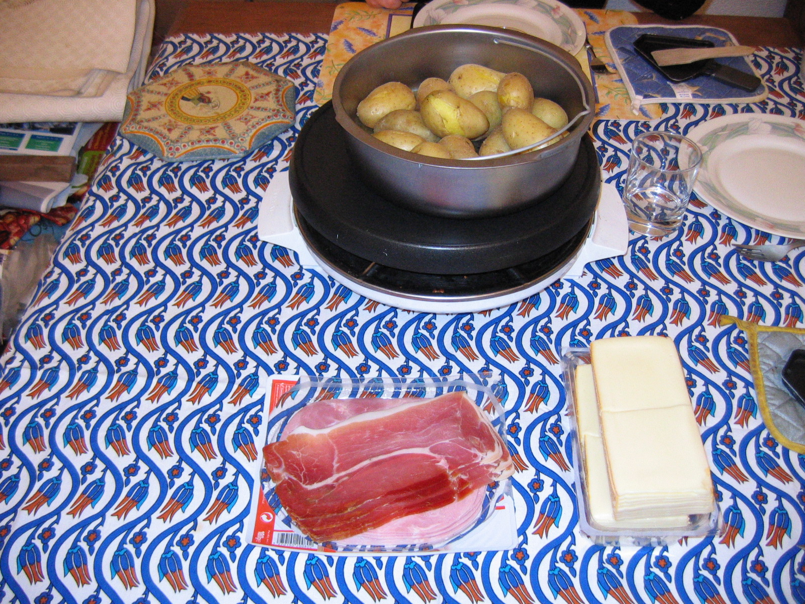 Maya2003